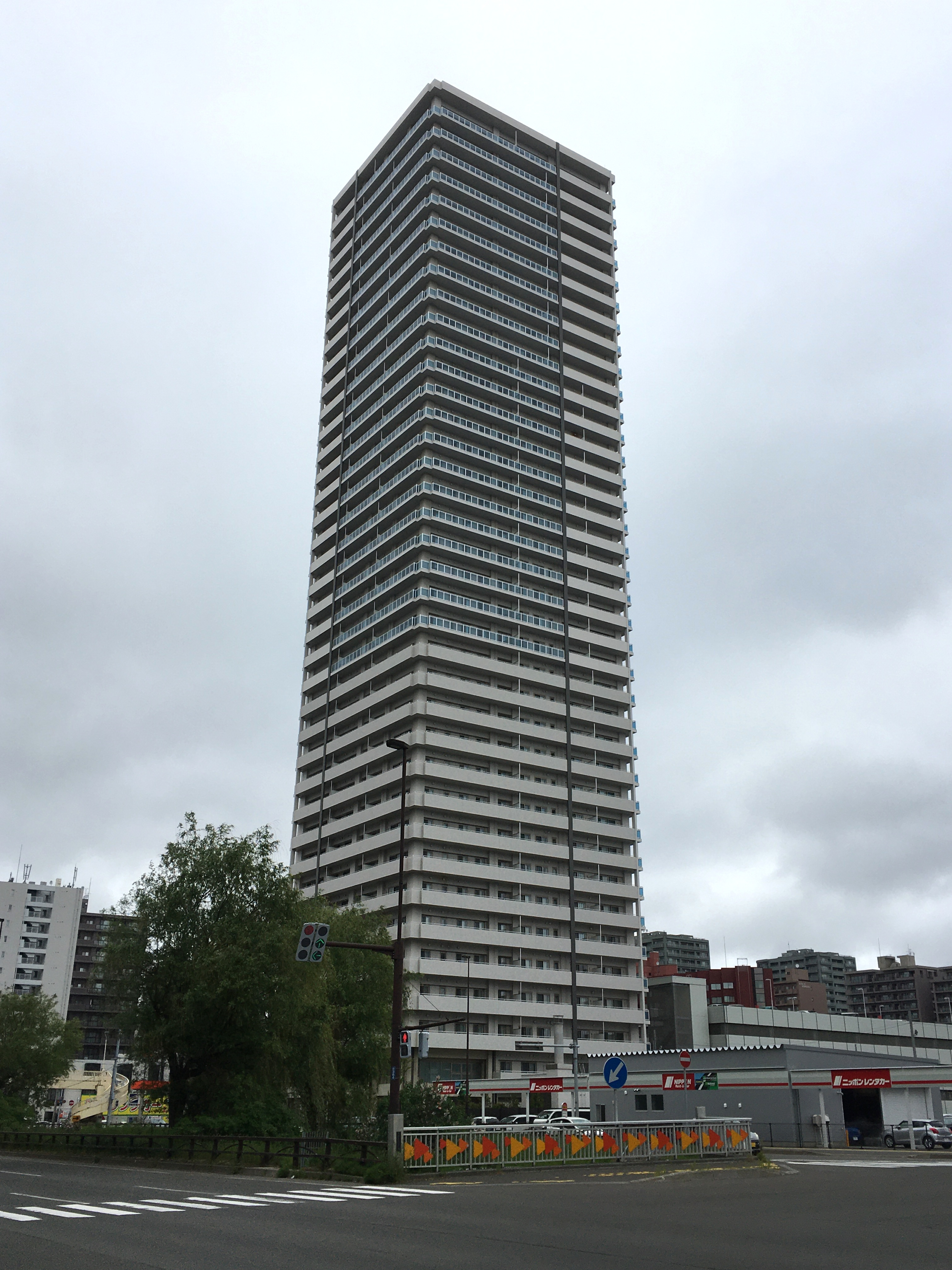 プレミスト札幌ターミナルタワー（札幌市東区）